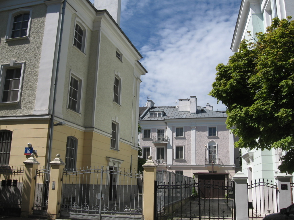 Warszawa, Stara Ochota, kamienice przy ul. Mianowskiego